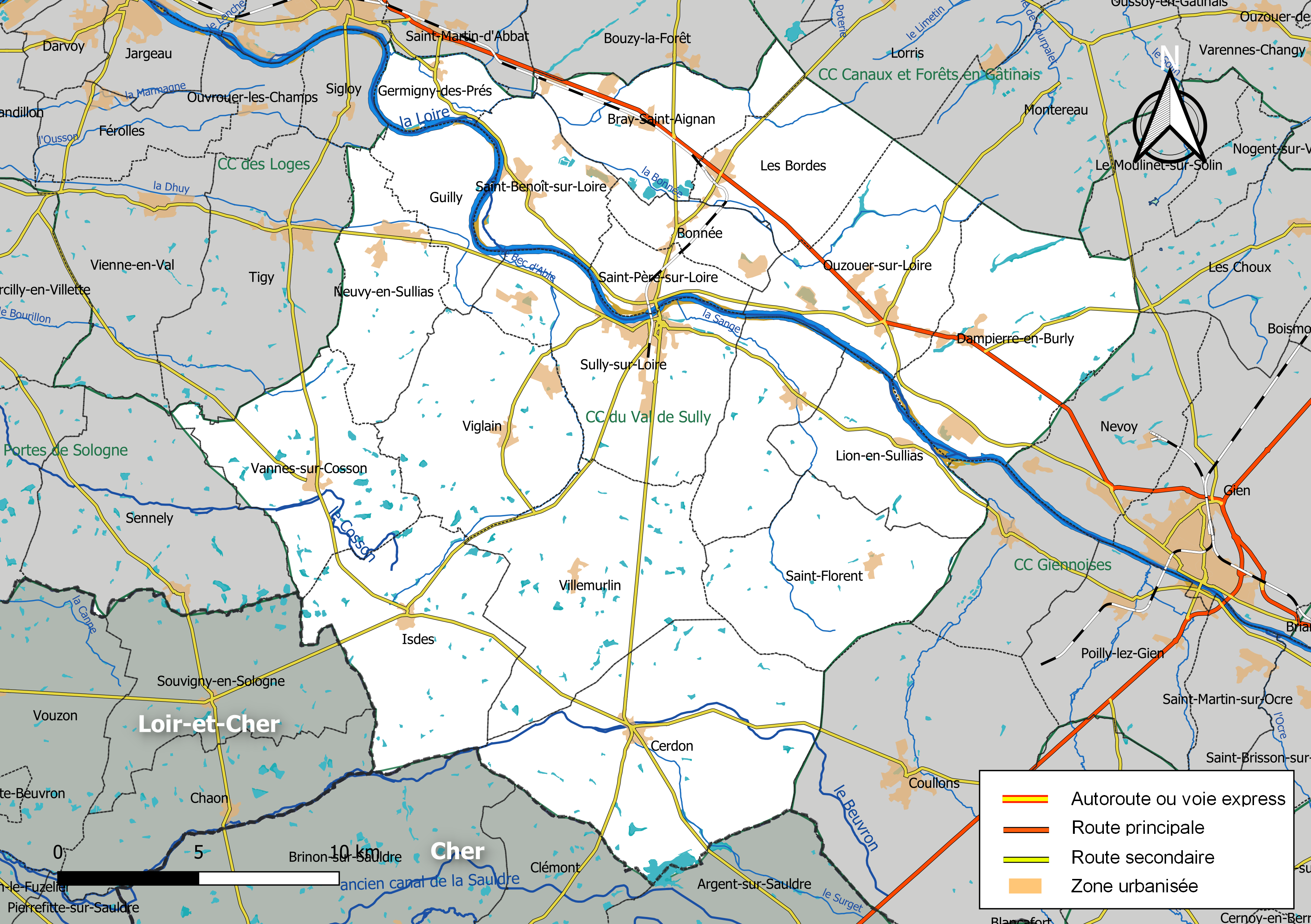 Carte géographique de la communauté de communes du Val de Sully, département du Loiret, France. Composition au 1er janvier 2019.